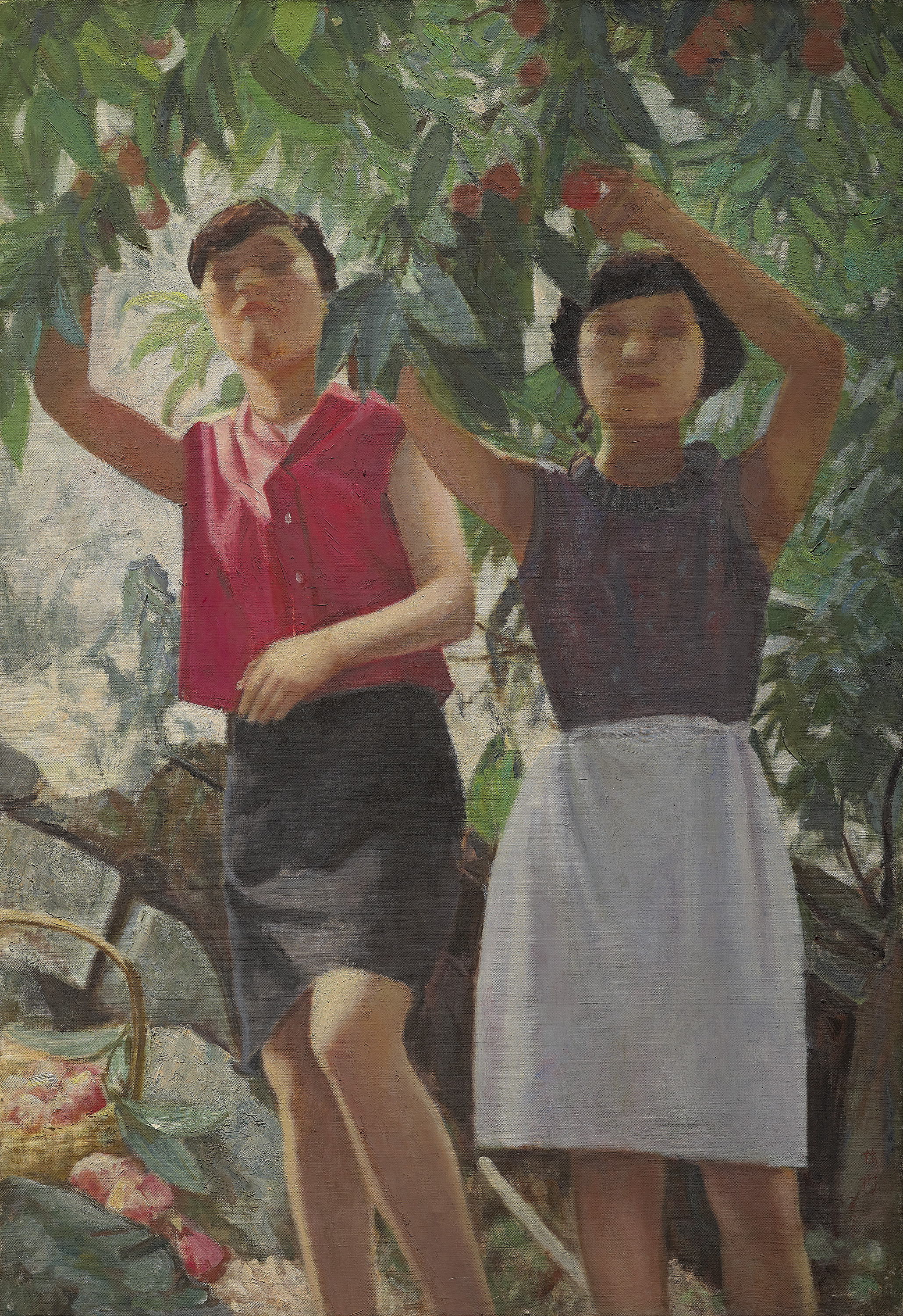 李梅樹 1969 【摘蓮霧-2】 油彩，畫布 116.5 x 80 cm